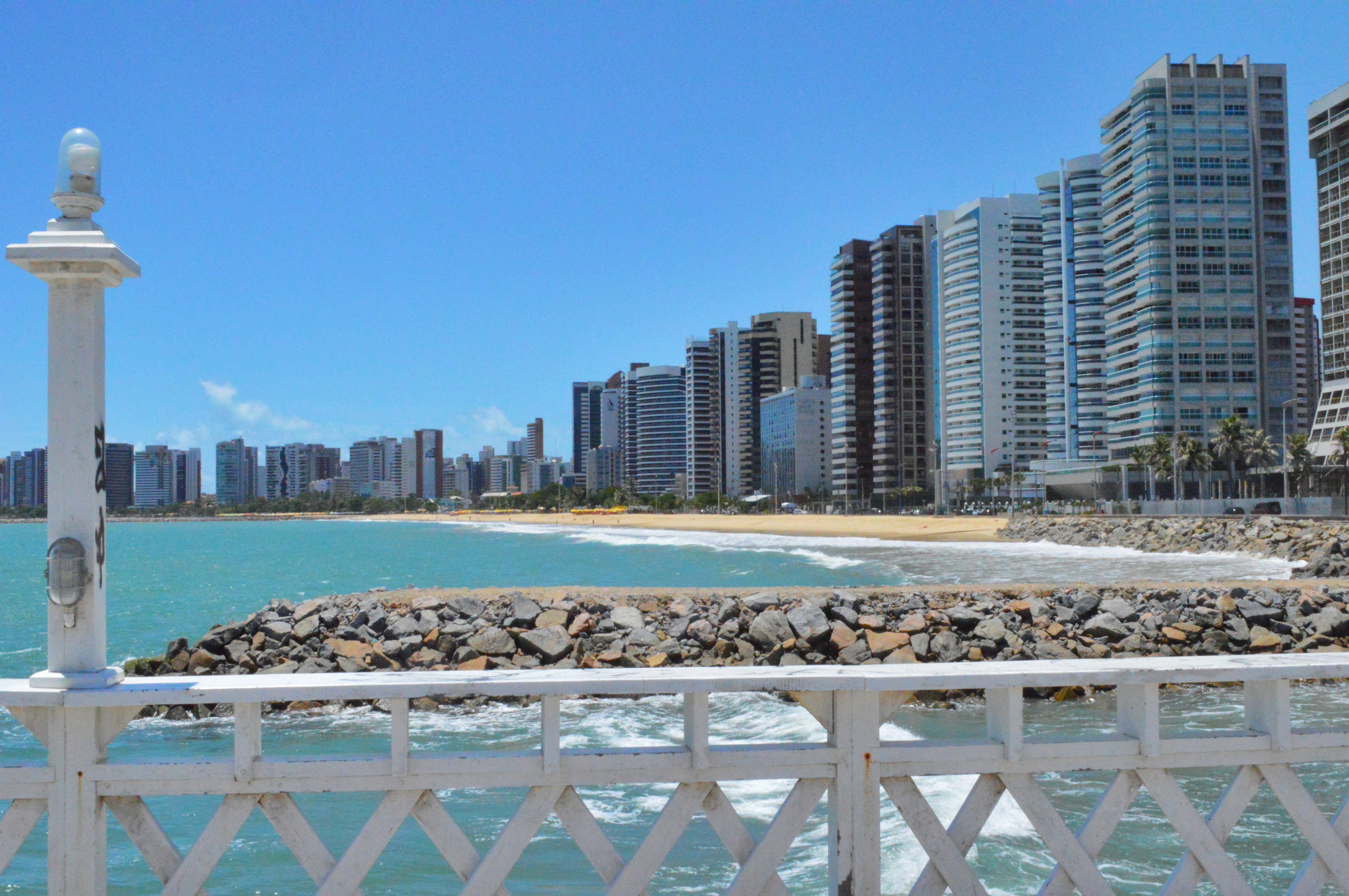 Praia de Iracema em Fortaleza, CE.